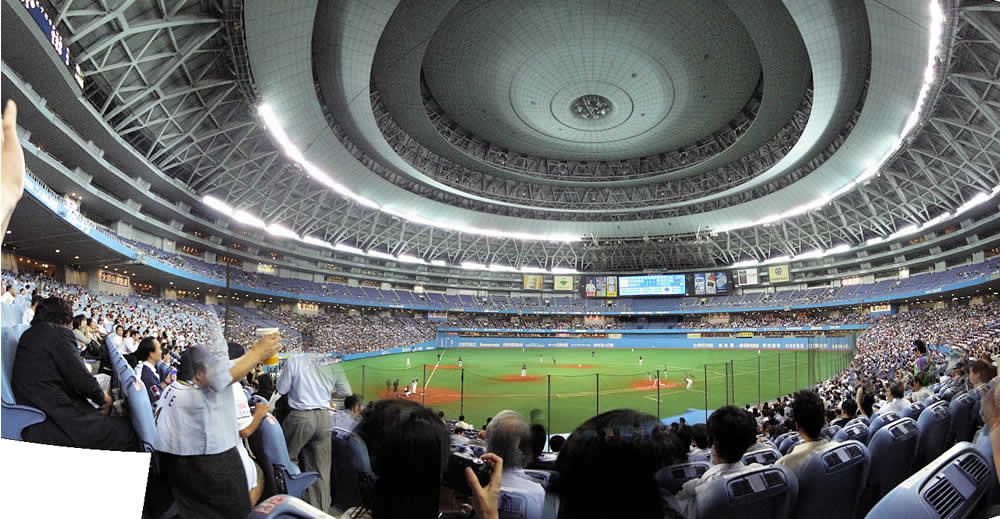 京セラドーム大阪内部（オリックス対福岡ソフトバンク戦）